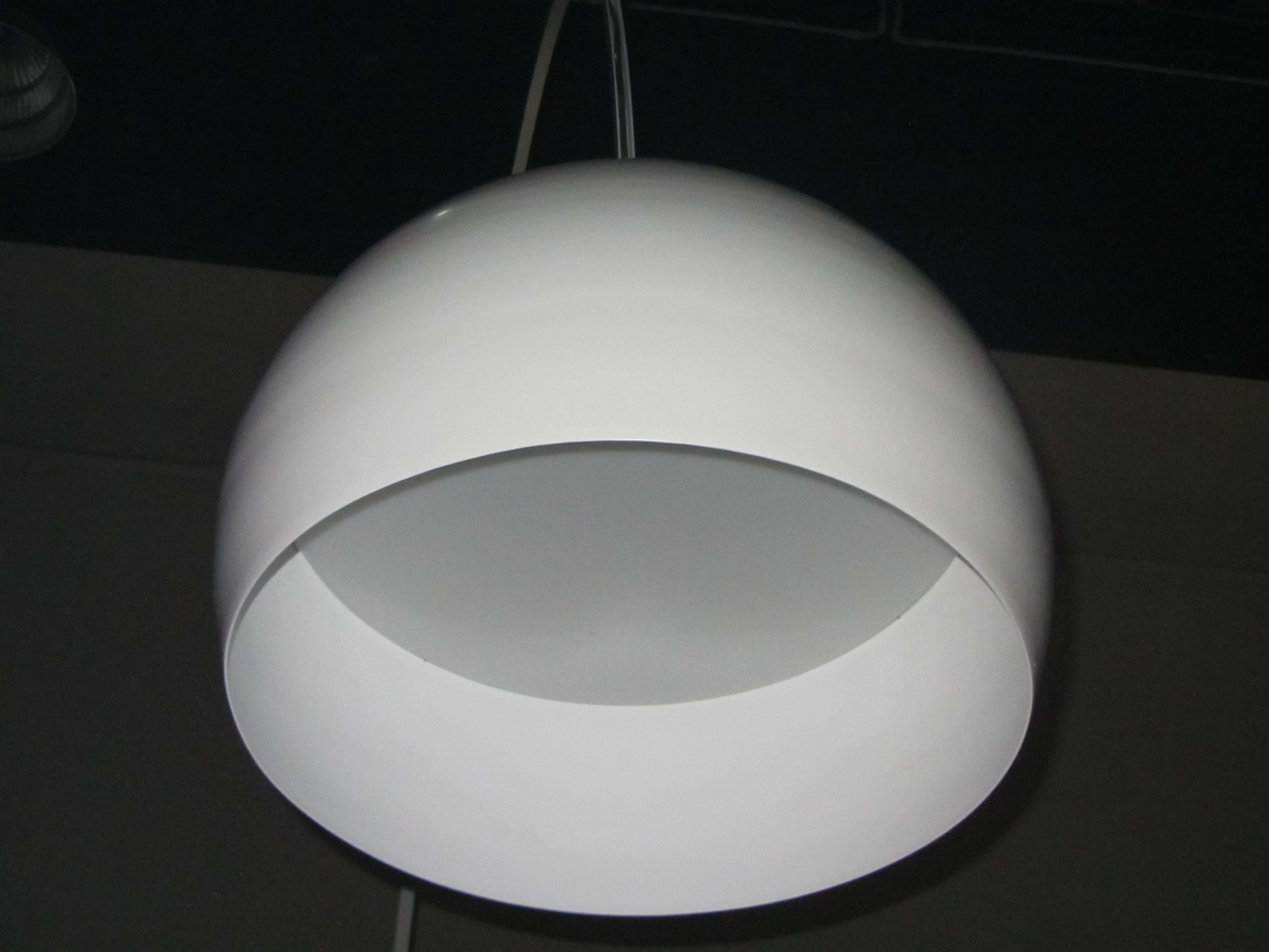 Festa dei 50 anni della FLOS Evento tenutosi durante il Fuorisalone 2012 (Milan Design Week) presso il Palazzo della Permanente a Milano in Italia. Evento chiuso (su invito) Open Bar, Dj set, catering ed esposizione di tutte le lampade FLOS (anche quelle fuori produzione) dal 1962 al 2012.